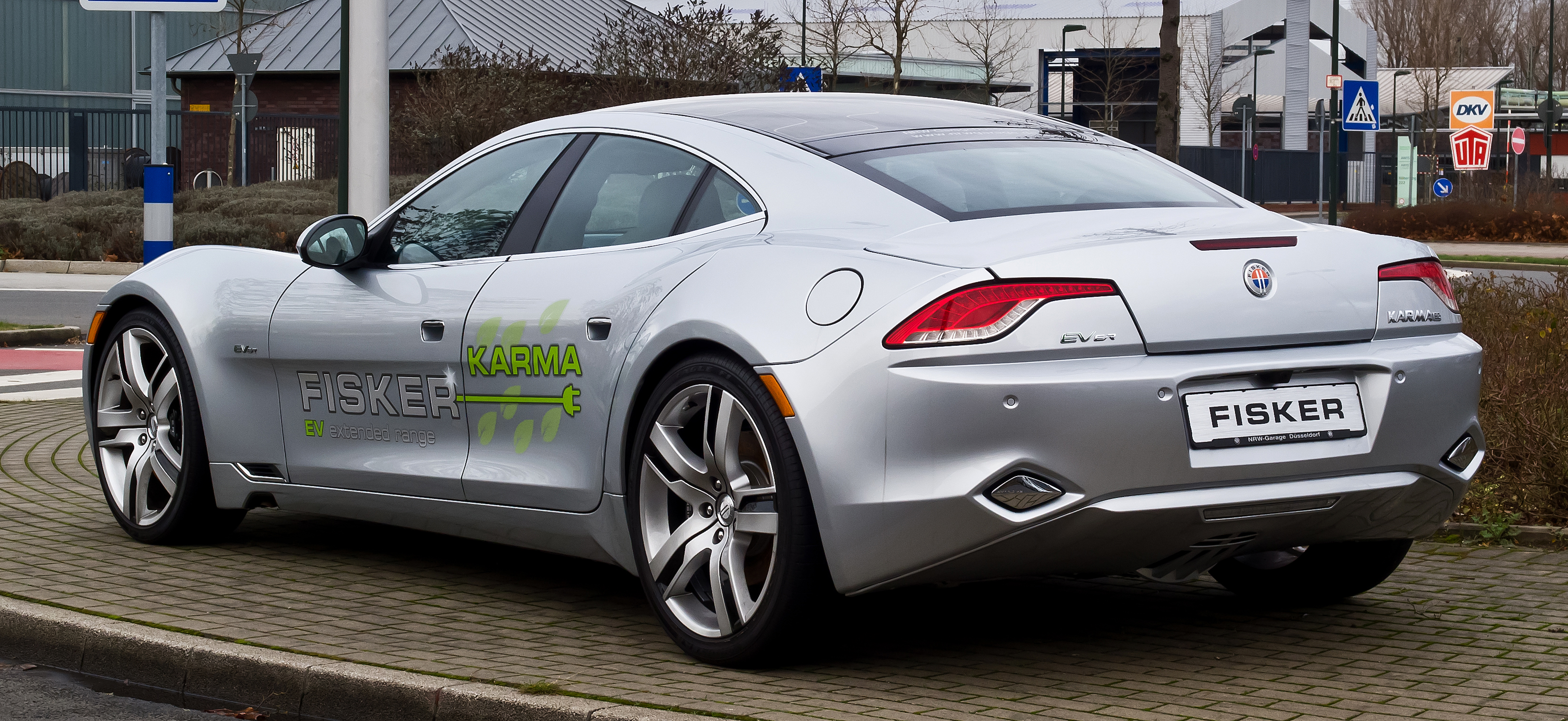 Fisker Karma EVer EcoChic